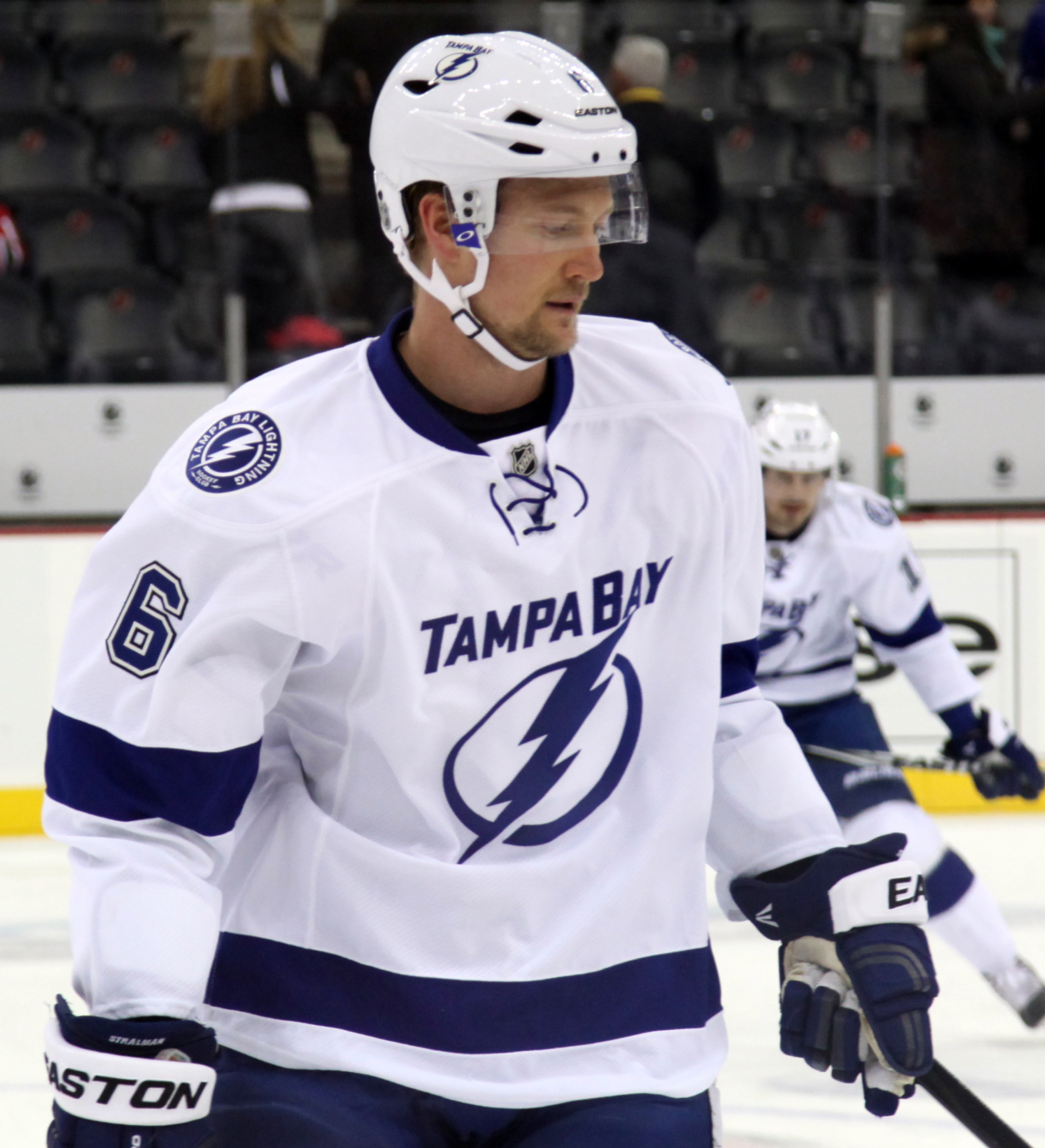 Stralman in December 2014.